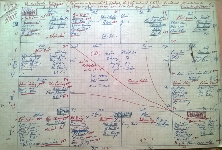 H. Richard Krygier, journalist